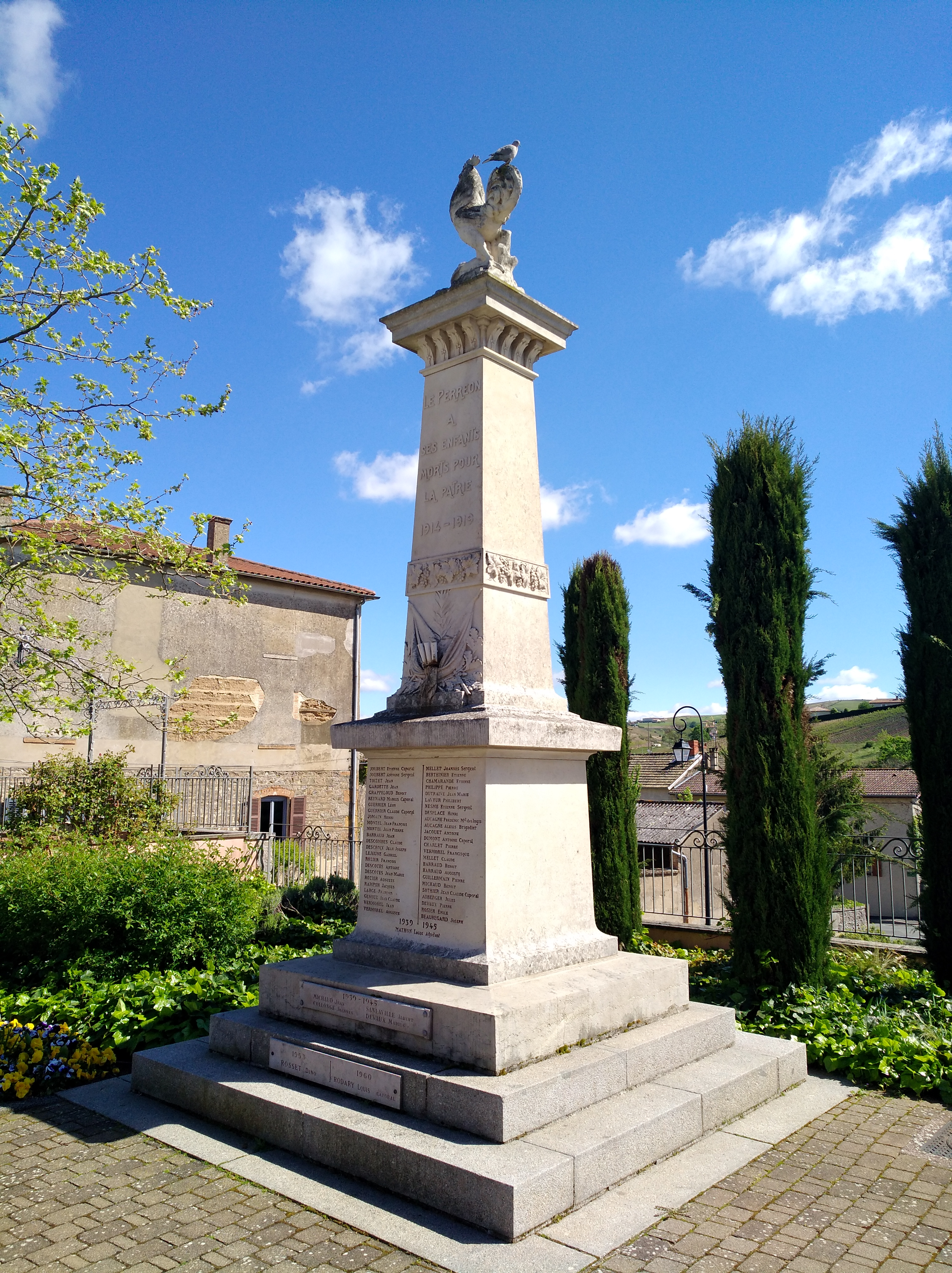 Monument aux morts du Perréon (Rhône, France).